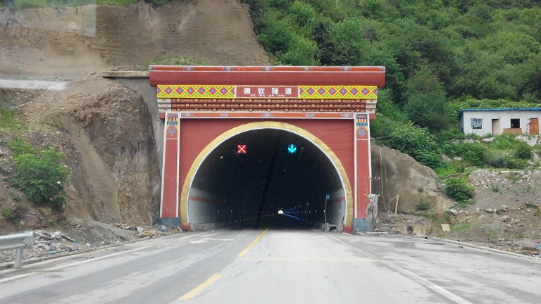 中国国道G214 香格里拉段 德钦隧道